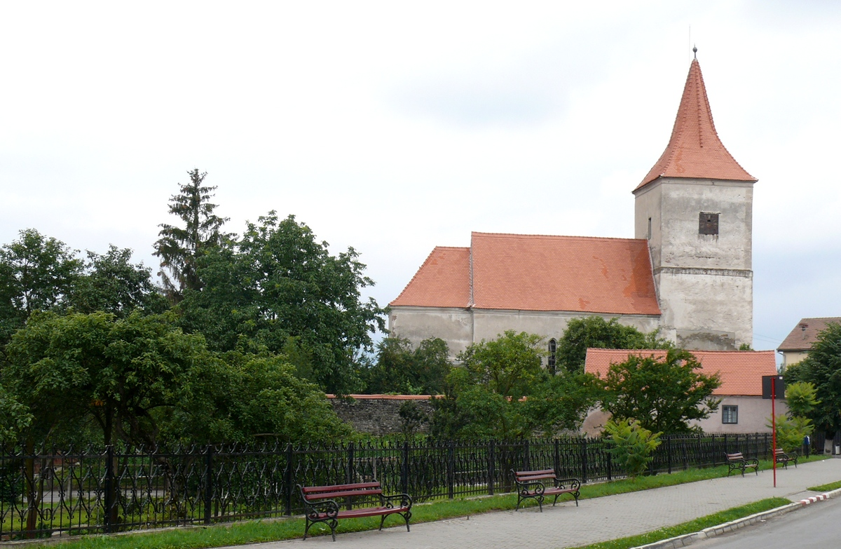 Biserica evanghelică 01